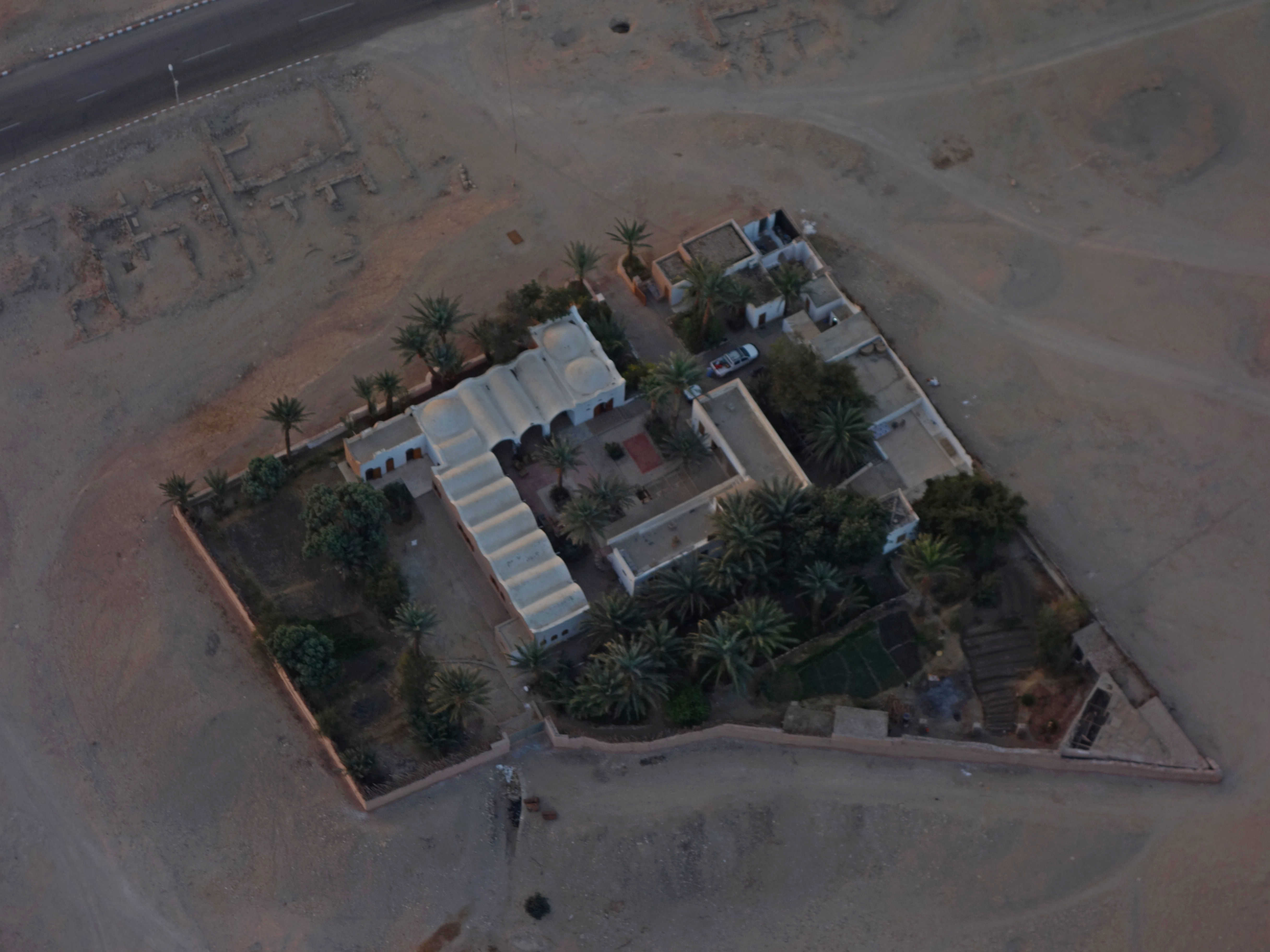 Luftaufnahme des Grabungshauses des Deutschen Archäologischen Instituts Kairo in Luxor